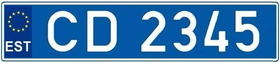 Эстонский дипломатический номер